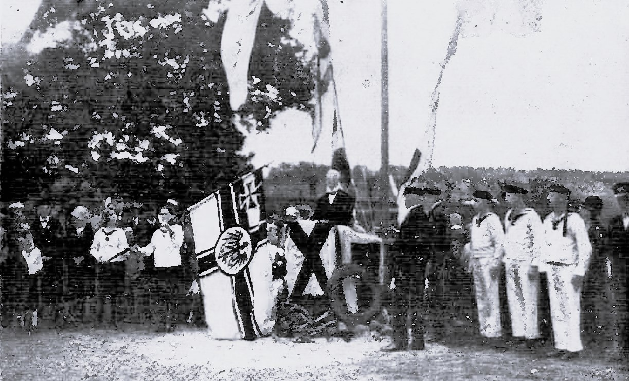 Im Garten der ehemaligen Lachswehr fand am Sonntag, dem 11. September die Flaggenweihe der Lübecker Marinejugend statt. Die Weihe vollzog Herr Hauptpastor Mildensten; mehrere Reden der Veiensfunktionäre, Musik und Gesangsvorträge umrahmten die Feier.